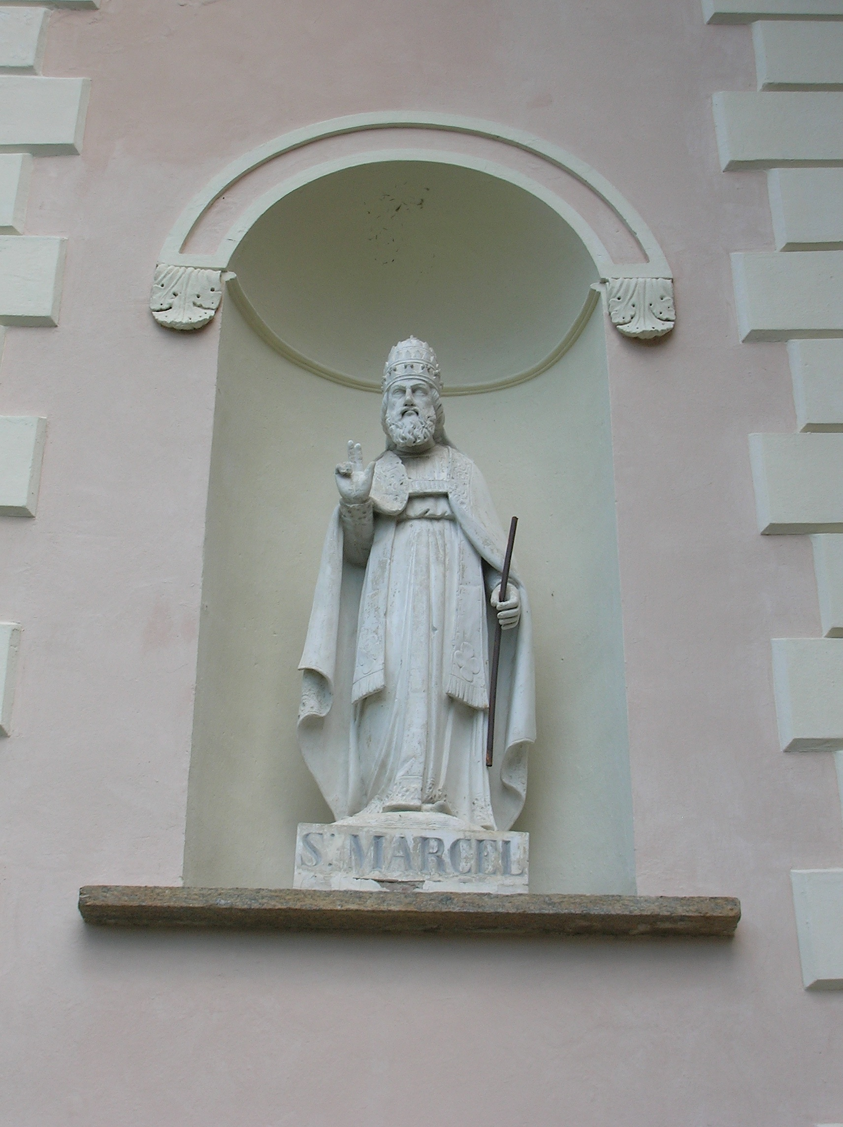 Santuario di Plout, Saint-Marcel, Valle d'Aosta, Italia.